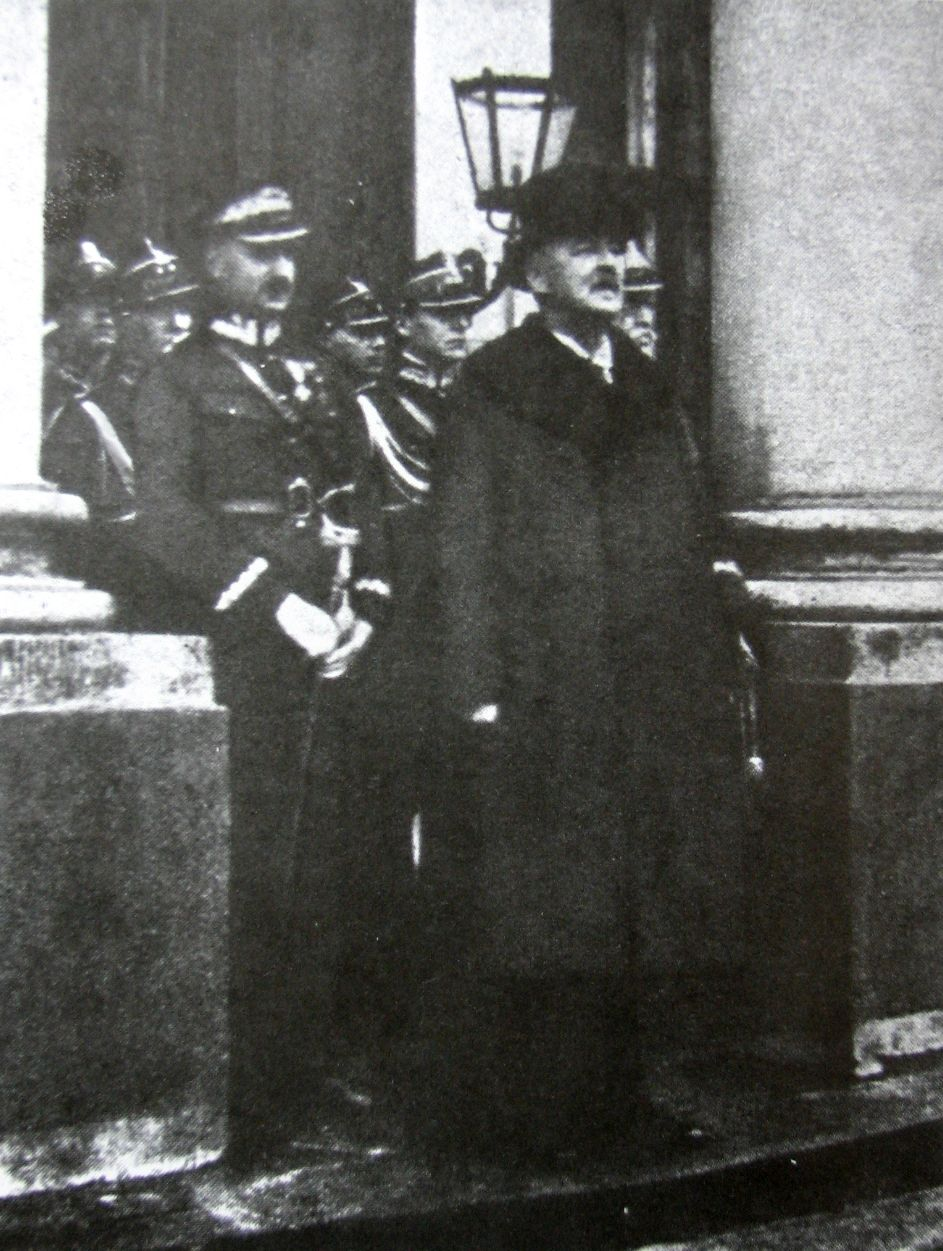 Prezydent Rzeczypospolitej Polskiej Gabriel Narutowicz wychodzący z Sejmu po złożeniu przysięgi.